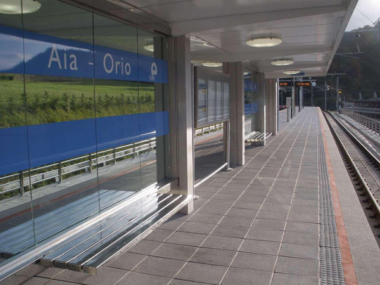 Estación de EuskoTren en Orio (Gipuzkoa)